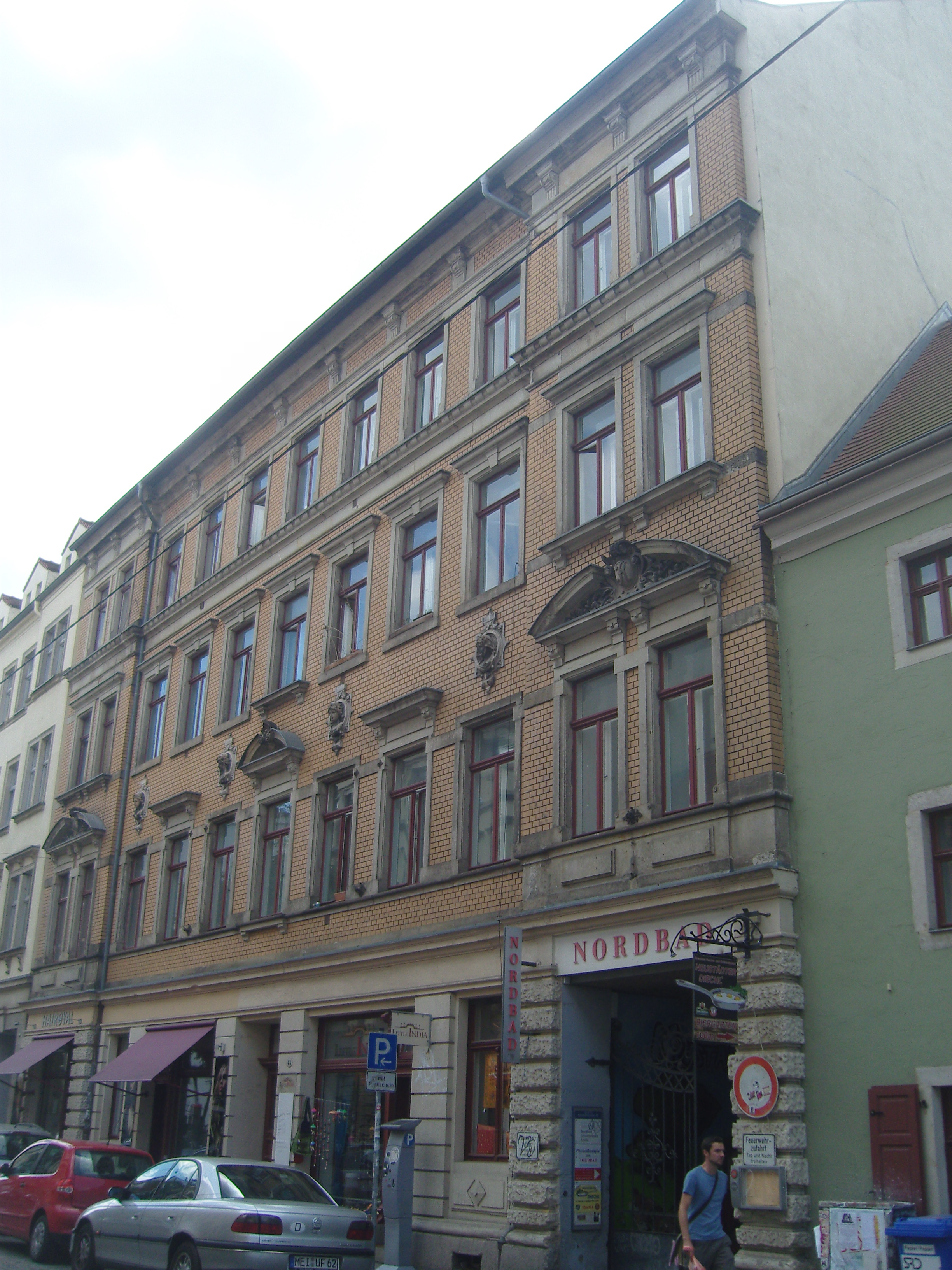 Denkmalgeschütztes Mietshaus mit Eingang zum Nordbad in der Louisenstraße 48 in Dresden